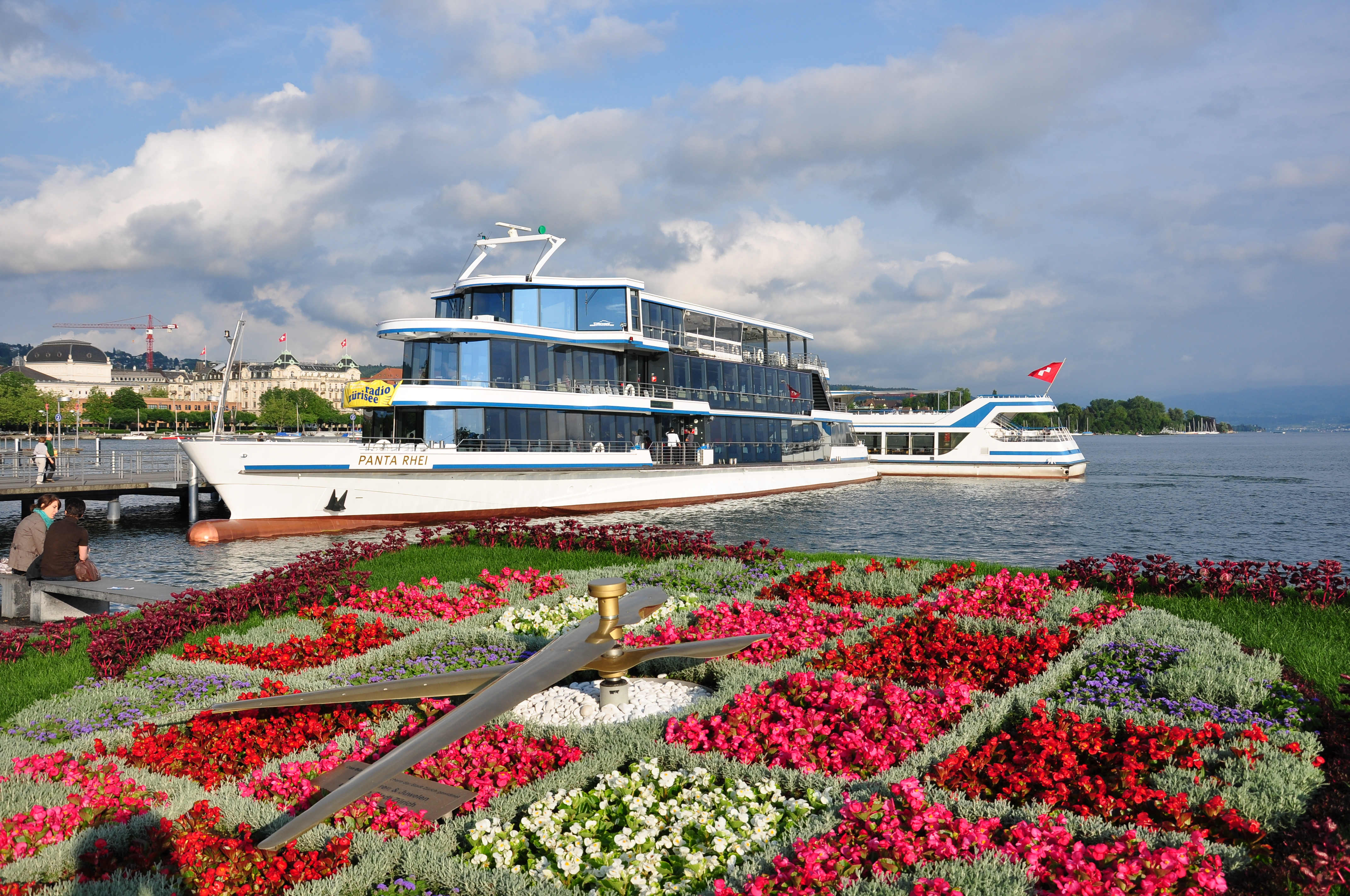 Zürichsee-Schiffahrtsgesellschaft (ZSG) : Motor ship Panta Rhei at Bürkliplatz landing gate on Zürichsee (Lake Zürich).